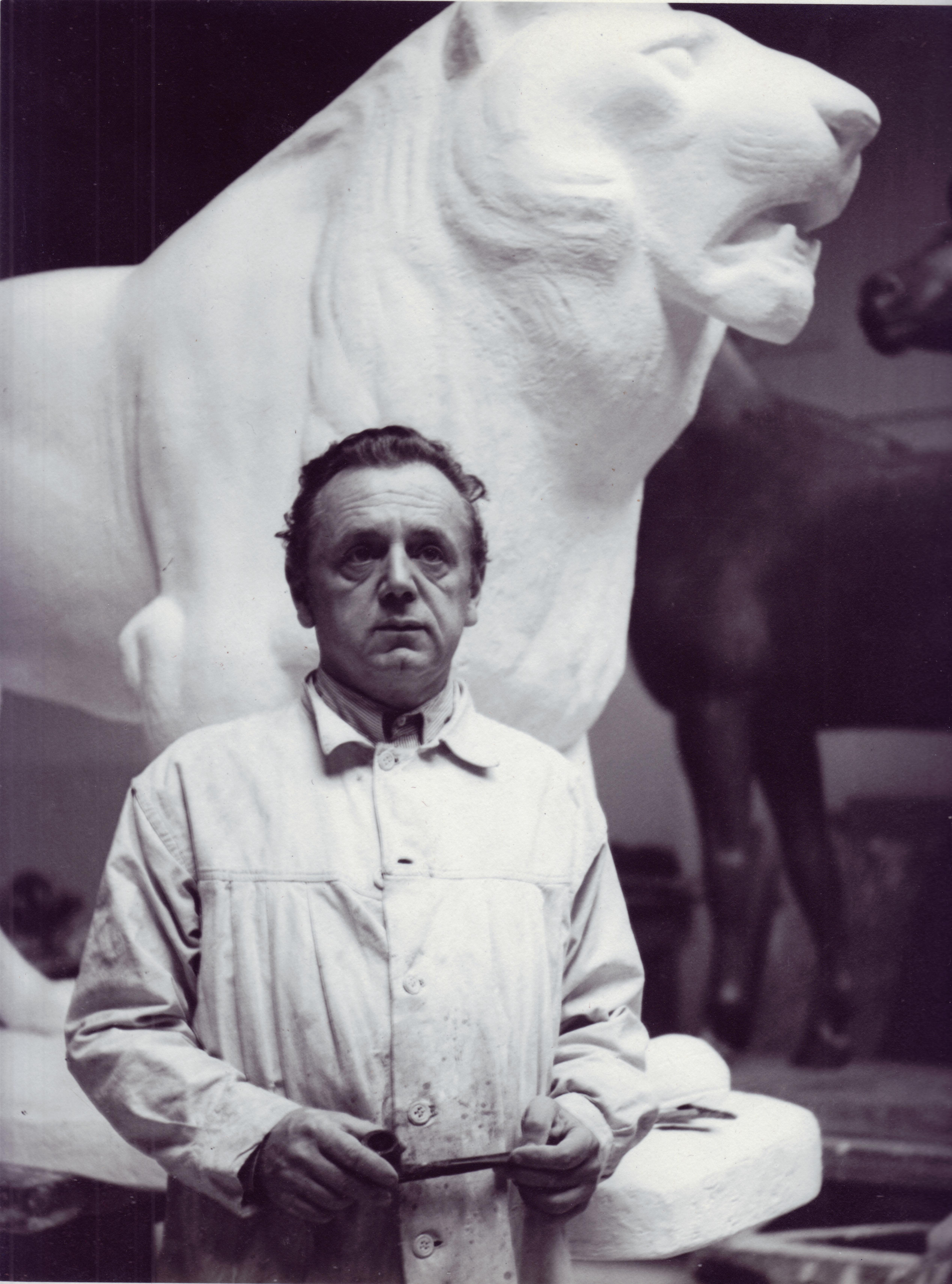 Philipp Harth (1885-1968) in seinem Berliner Atelier 1940, hinter ihm das Gipsmodell seines "Löwen".